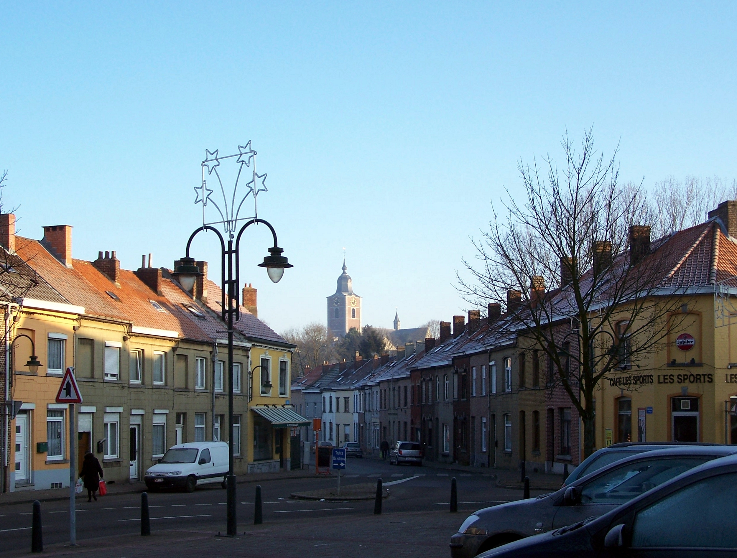 Eigenbrakel (nl), Braine-l'Alleud (fr)